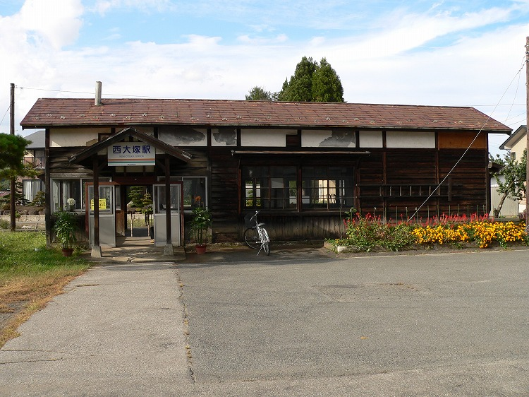 Nishi-otsuka station